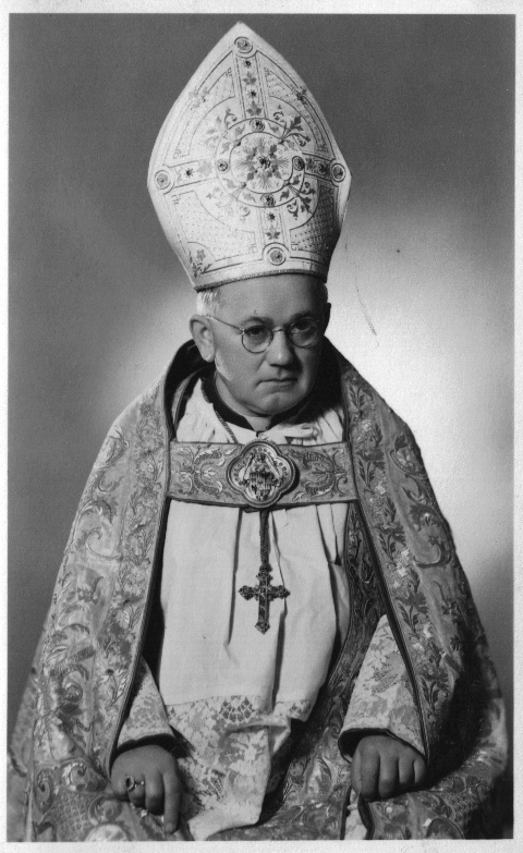 Portrét arcibiskupa olomouckého a metropolity moravského Ph a ThDr. Josefa Karla Matochy